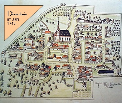 Ortsplan von Dirmstein aus dem Jahr 1746, Aufnahme durch Ortsbürgermeister Jürgen Schwerdt, Freigabe (GNU-Lizenz) gem. Mail vom 28.04.2006 an Benutzer:Mundartpoet